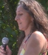 Susanne Møller, formand for Sexarbejdernes Interesseorganisation, København